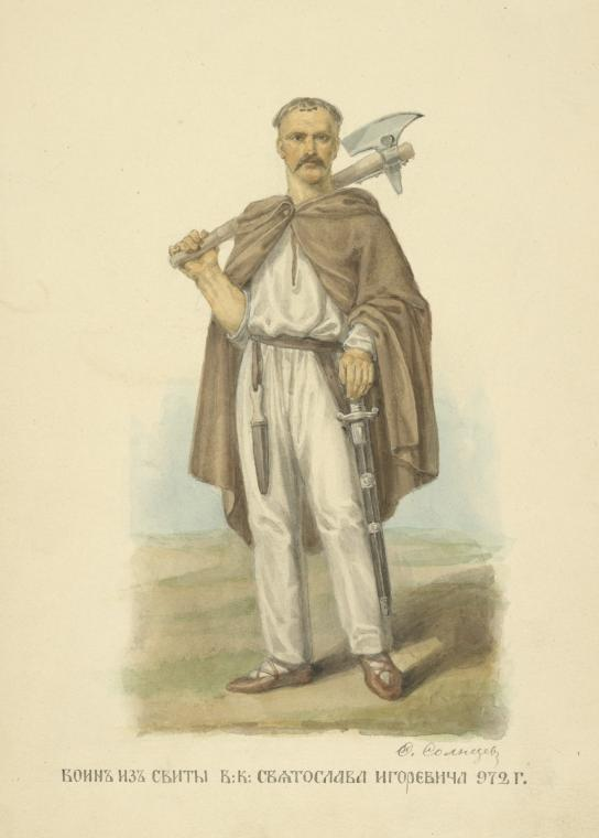 Воин-рус, X в.